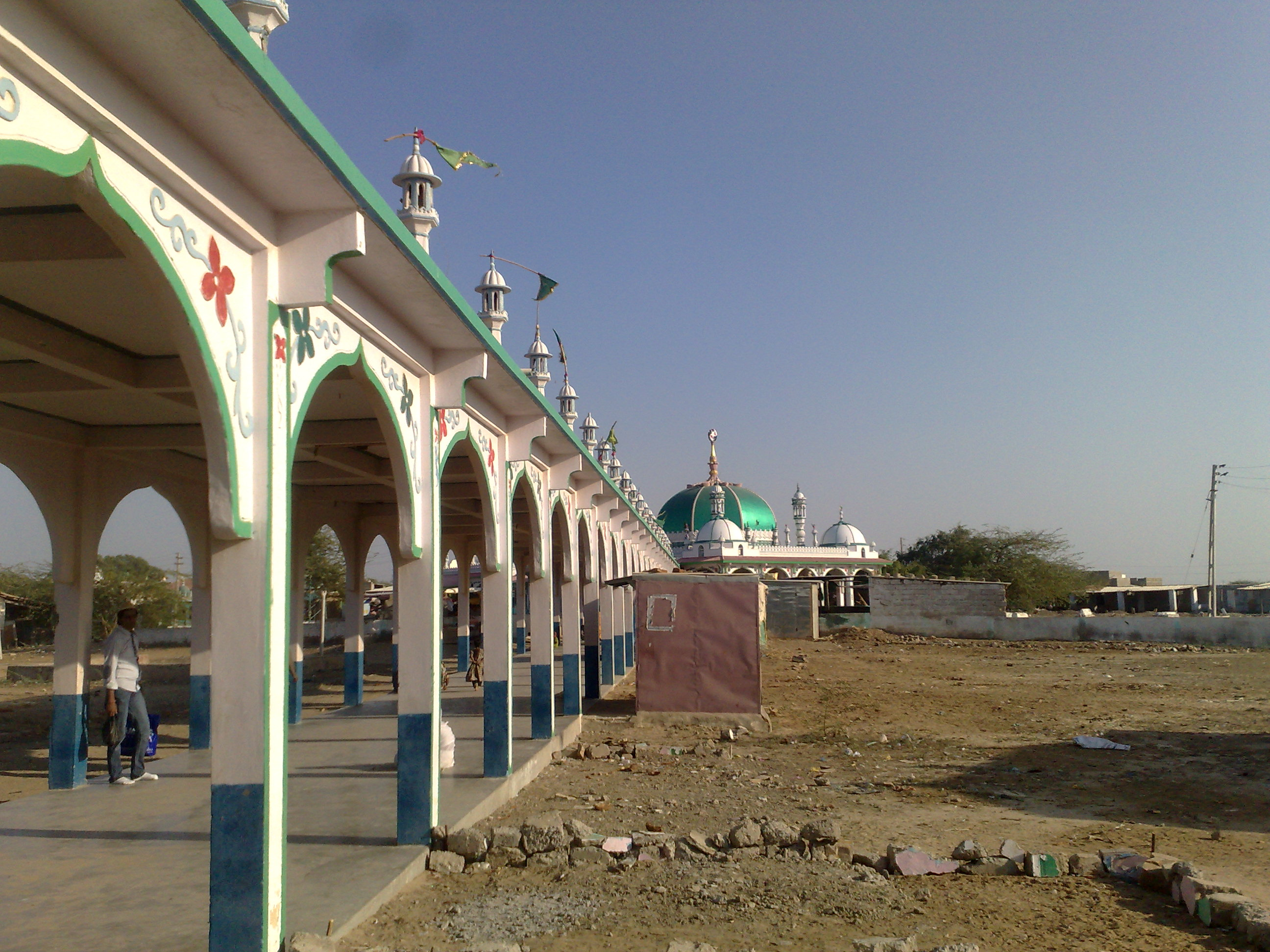 Haji Peer Dargah from far back